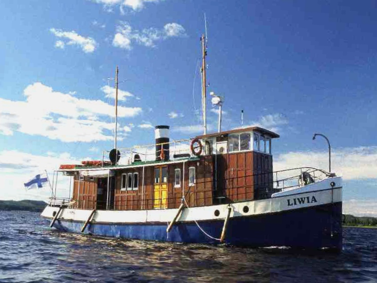 Liwia vuonna 2003 Saravedellä, Keiteleen kanavalla